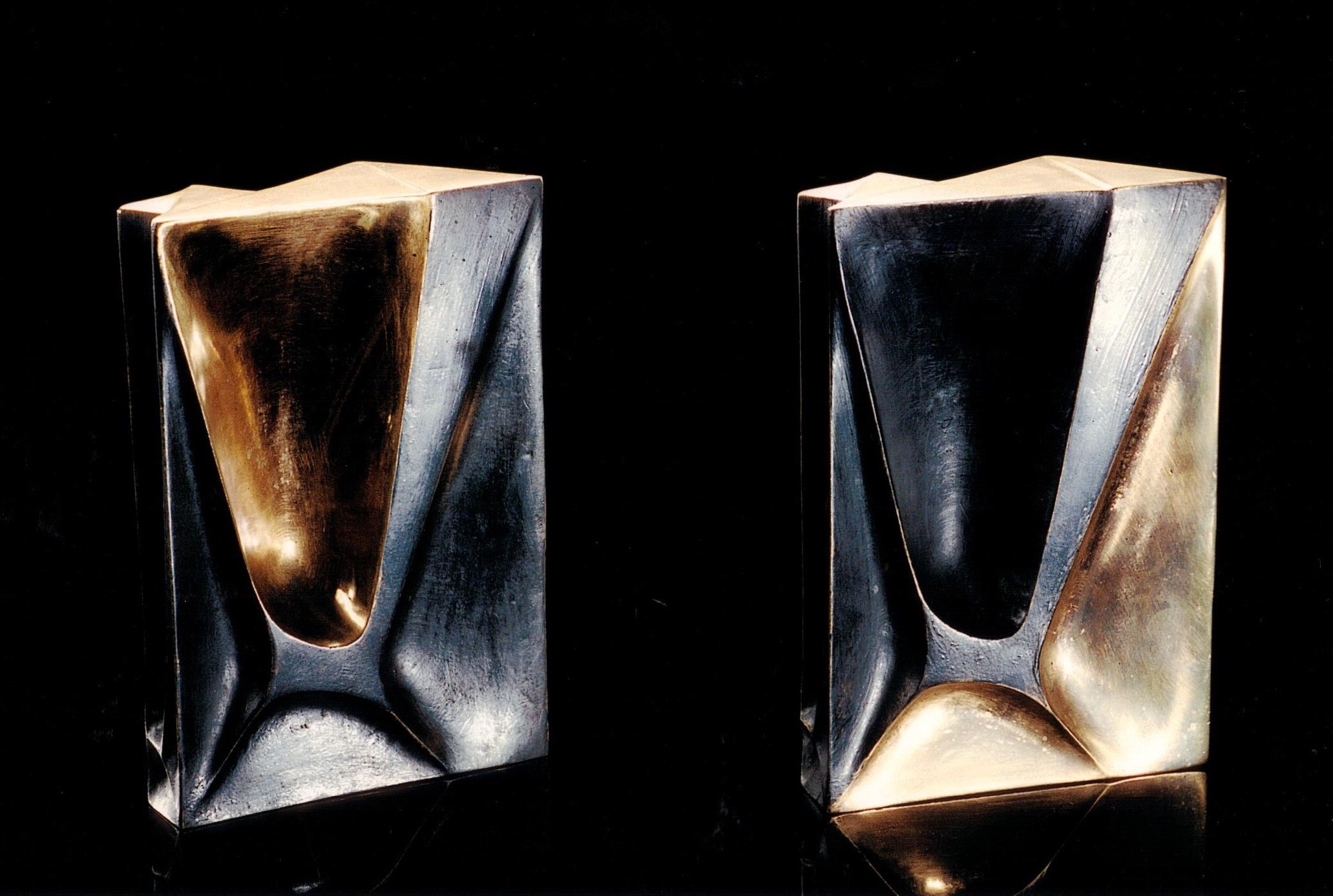 Bronzeplastik, Bronze-Guss mit unterschiedlichen Oberflächenbearbeitungen ca. 1980, zuvor Holz ca 1960